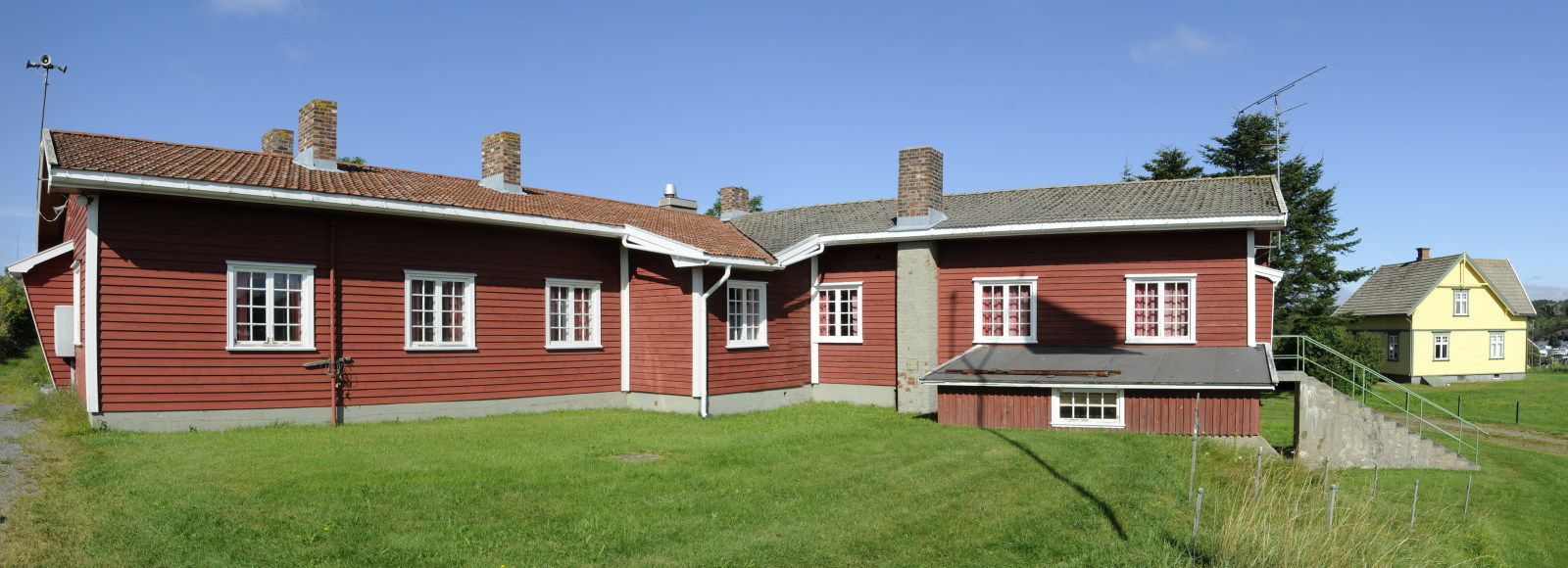 Messe-/forlegning-/kontorbygg